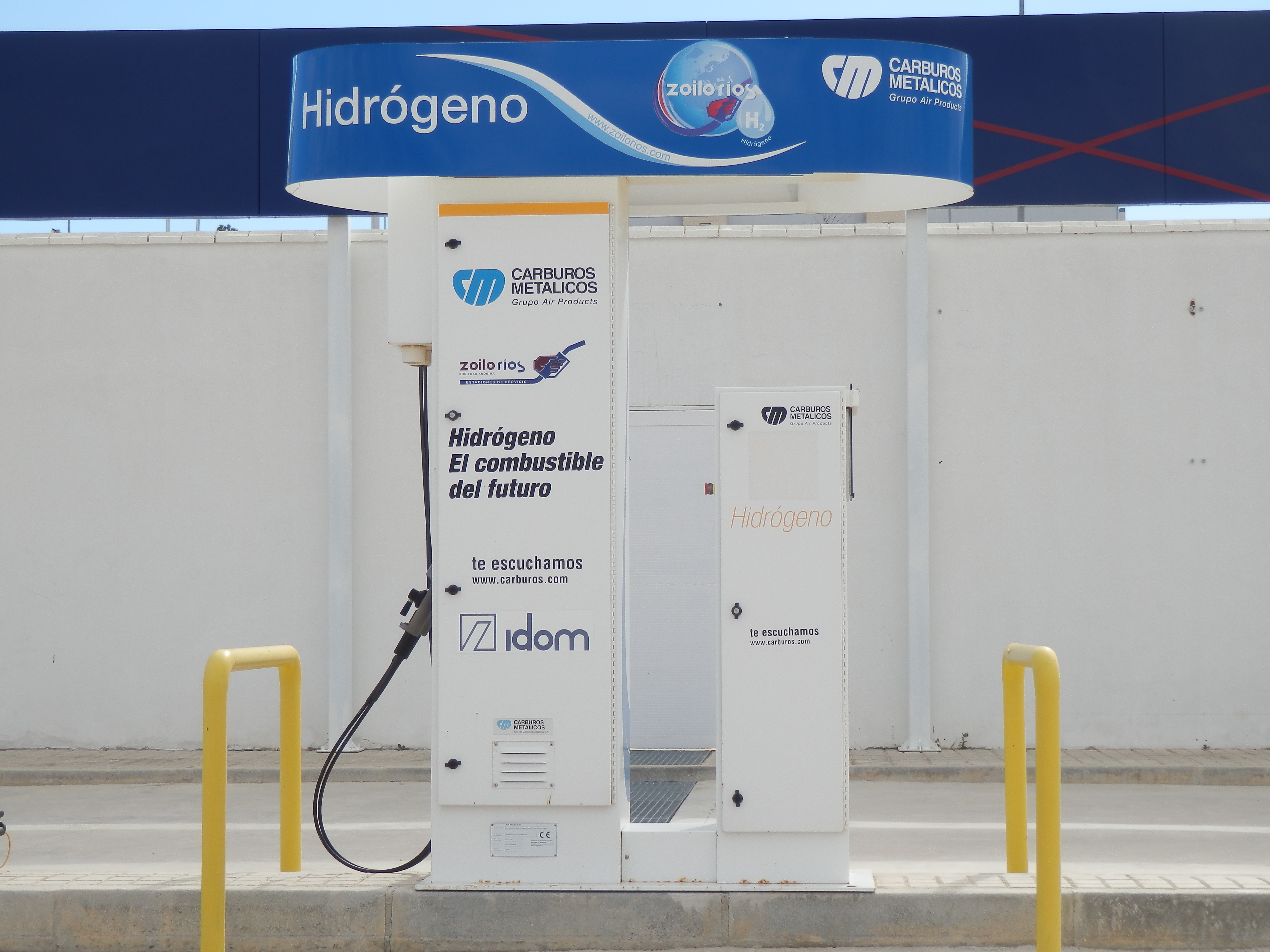 Hidrogenera situada en la calle Centauros del Desierto, Zaragoza. Inaugurada en 2008.